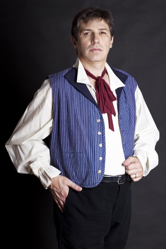 Alessandro Fantini